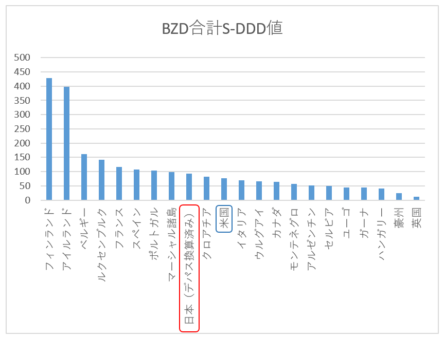 INCBデータ2016年版、134ページ～144ページ参照。